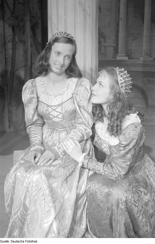 Original image description from the Deutsche FotothekSzenenbilder